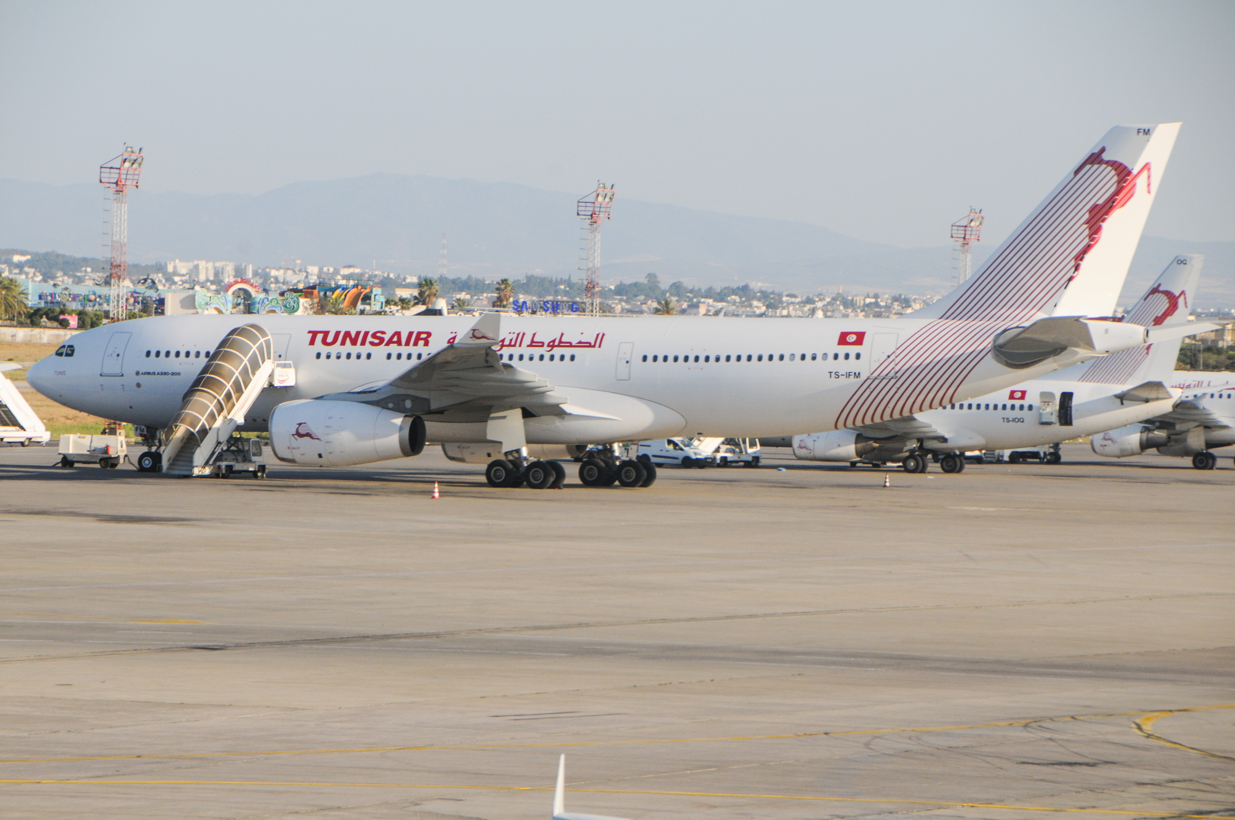 Le premier airbus A330 de Tunisair TS-IFM